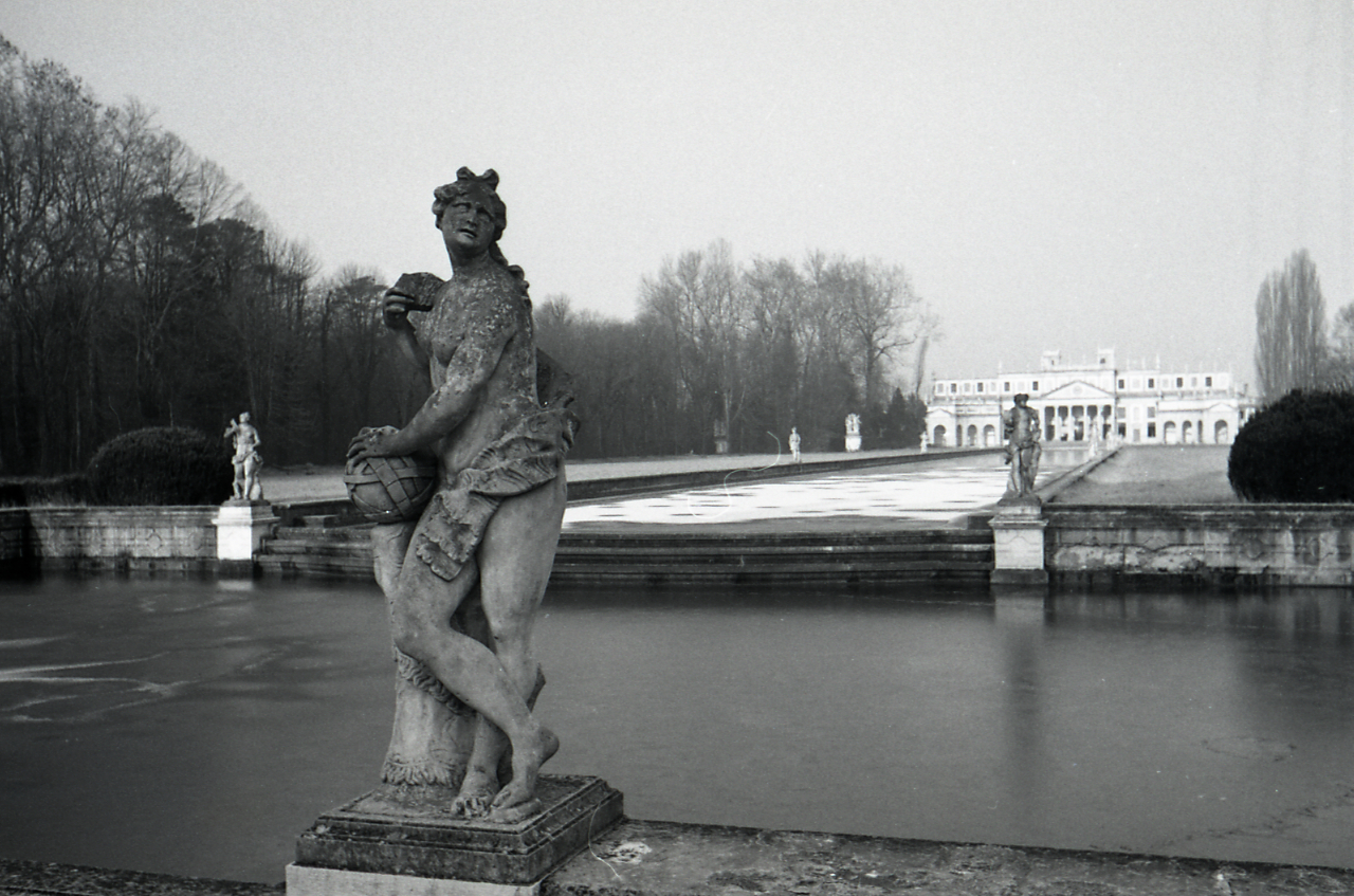 Serie fotografica : Stra, 1966 / Paolo Monti. - Strisce: 7, Fotogrammi complessivi: 35 : Negativo b/n, gelatina bromuro d'argento/ pellicola ; 35 mm. - ((I fotogrammi hanno una doppia numerazione. . - Sul portanegativi: Leica V Adox 21. - Sul dorso del portanegativi Monti specifica: "Bosco, parco, sculture. Vedute e particolari". - Occasione: Pubblicazione: Giovanni PREVITALI, Federico ZERI (a cura di), Storia dell'arte italiana, Torino, Einaudi, 1979 e segg. - Fonte: Agenda di Paolo Monti: Monti 4° / Archivio Negative (s.d.), presso Archivio Paolo Monti